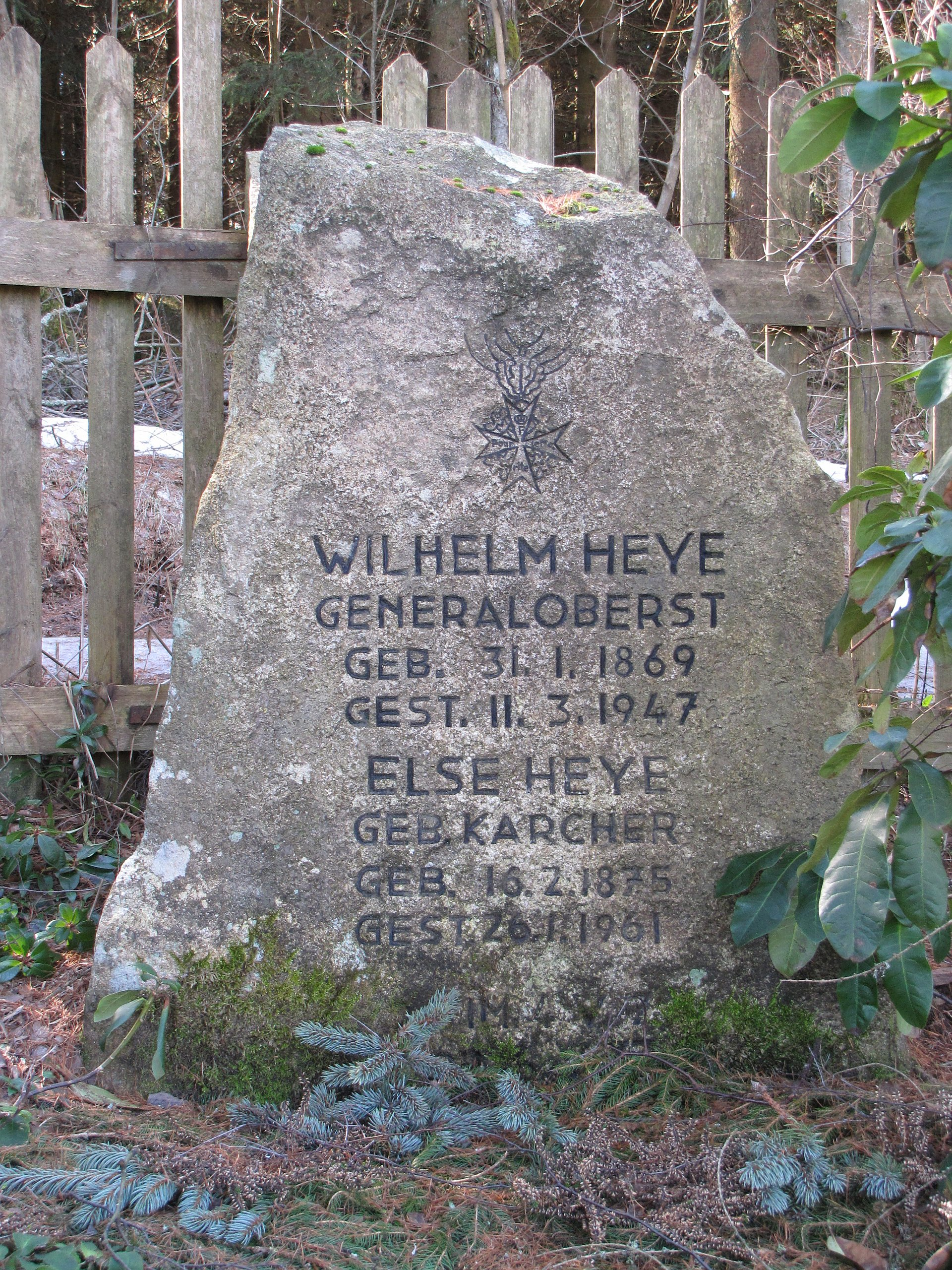 Grabstein von Wilhelm Heye auf dem Friedhof von Braunlage (Harz)